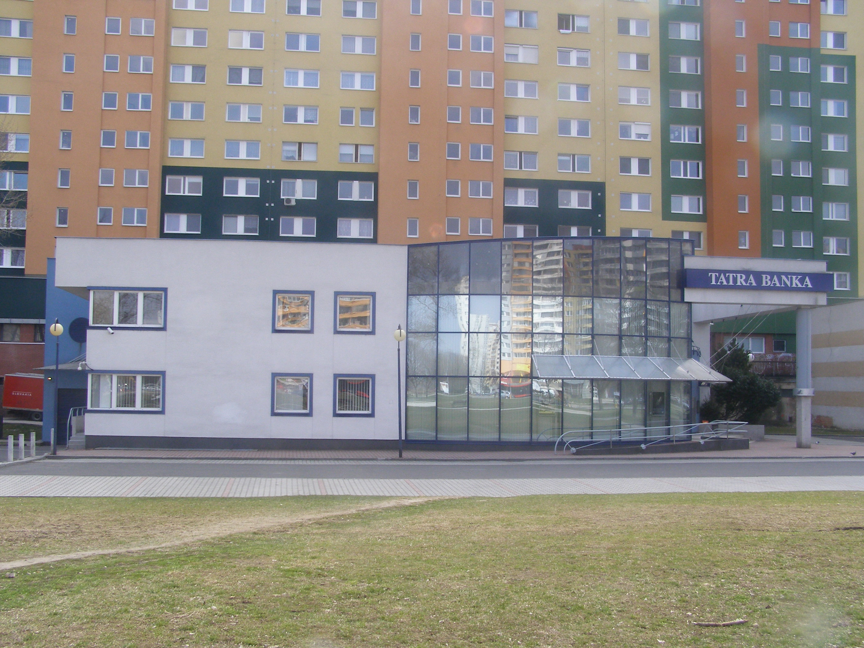 Tatrabanka na Tupoleovej 3/a, Petržalka, Bratislava